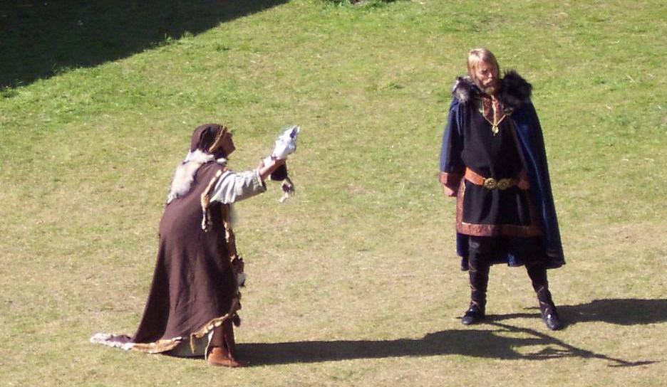 Steigen Sagaspill 2005 Ulvhild ber sigard forandre seg etter at han har dømt hagbart til døden.